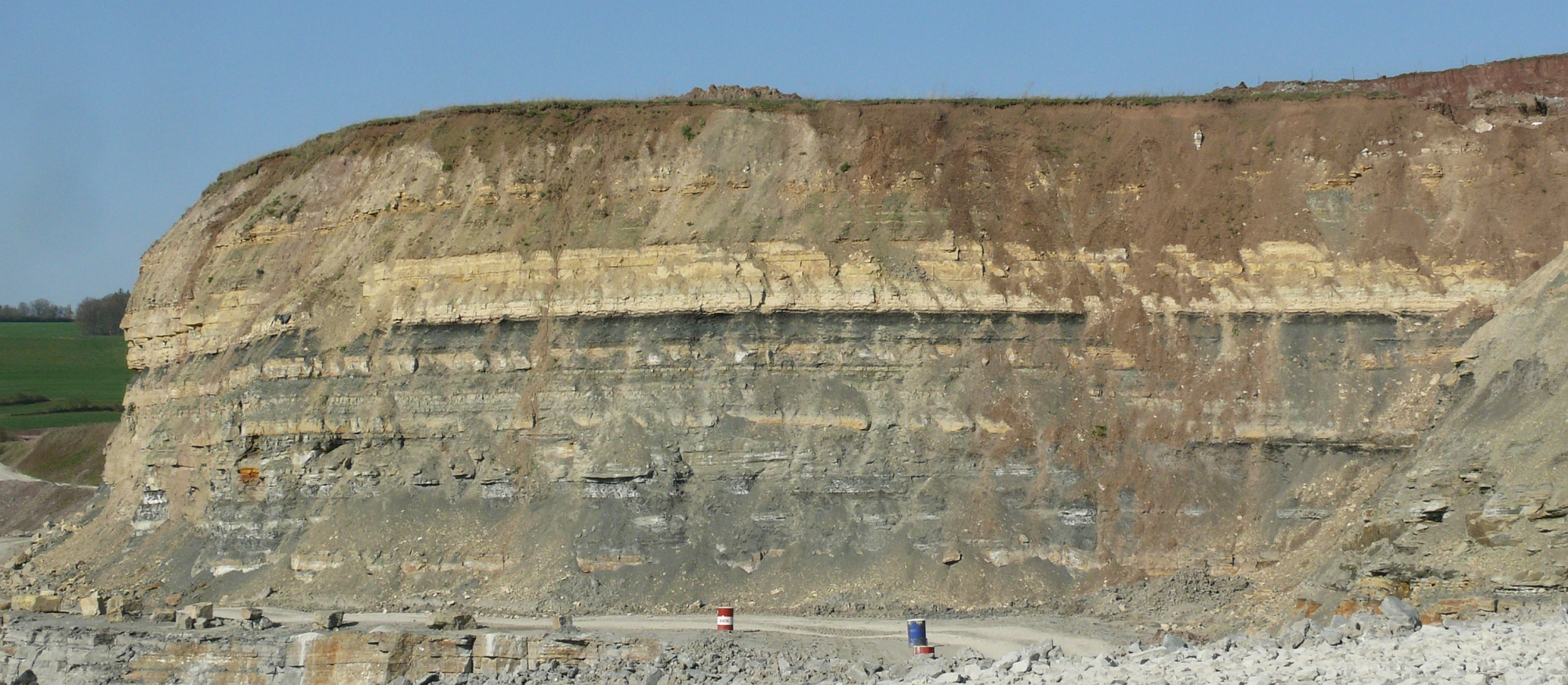 Erfurt-Formation, zwischen Muschelkalk und Grabfeld-FormationSteinbruch bei Vellberg-Eschenau